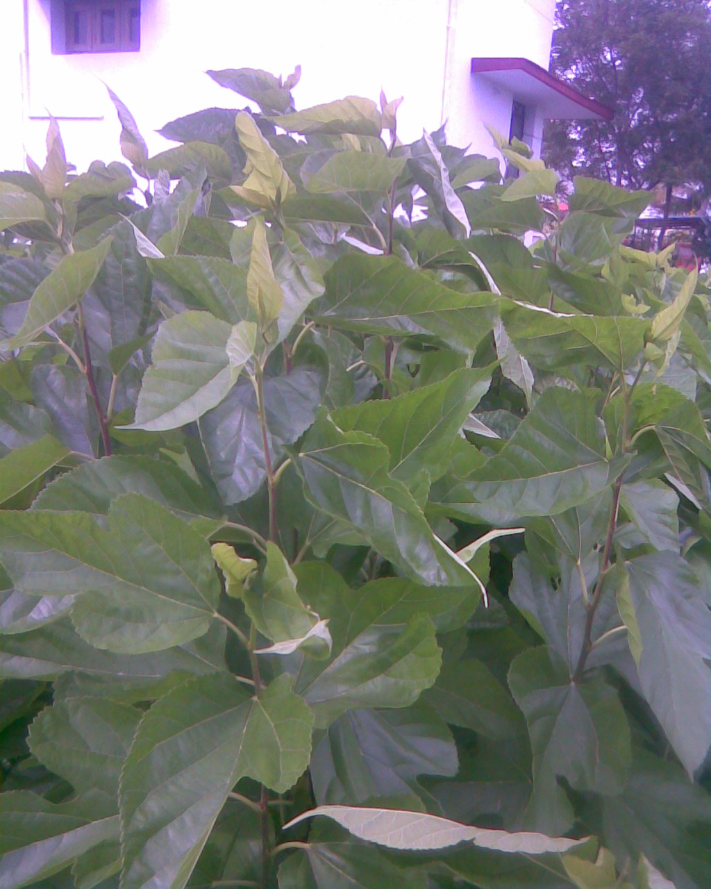 MR2 (Mildew Resistant Variety –2)This variety was developed by the TamilNadu Sericulture Department at their experimental station, Coonoor during 1970s. MR2 variety is resistant to powdery mildew disease caused by Phyllactinia corylea and is very popular in the plains of TamilNadu